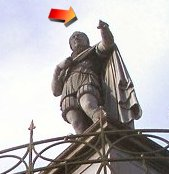 Place Guynemer (Nice)